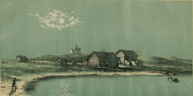 Кирилловская рыбная тоня.